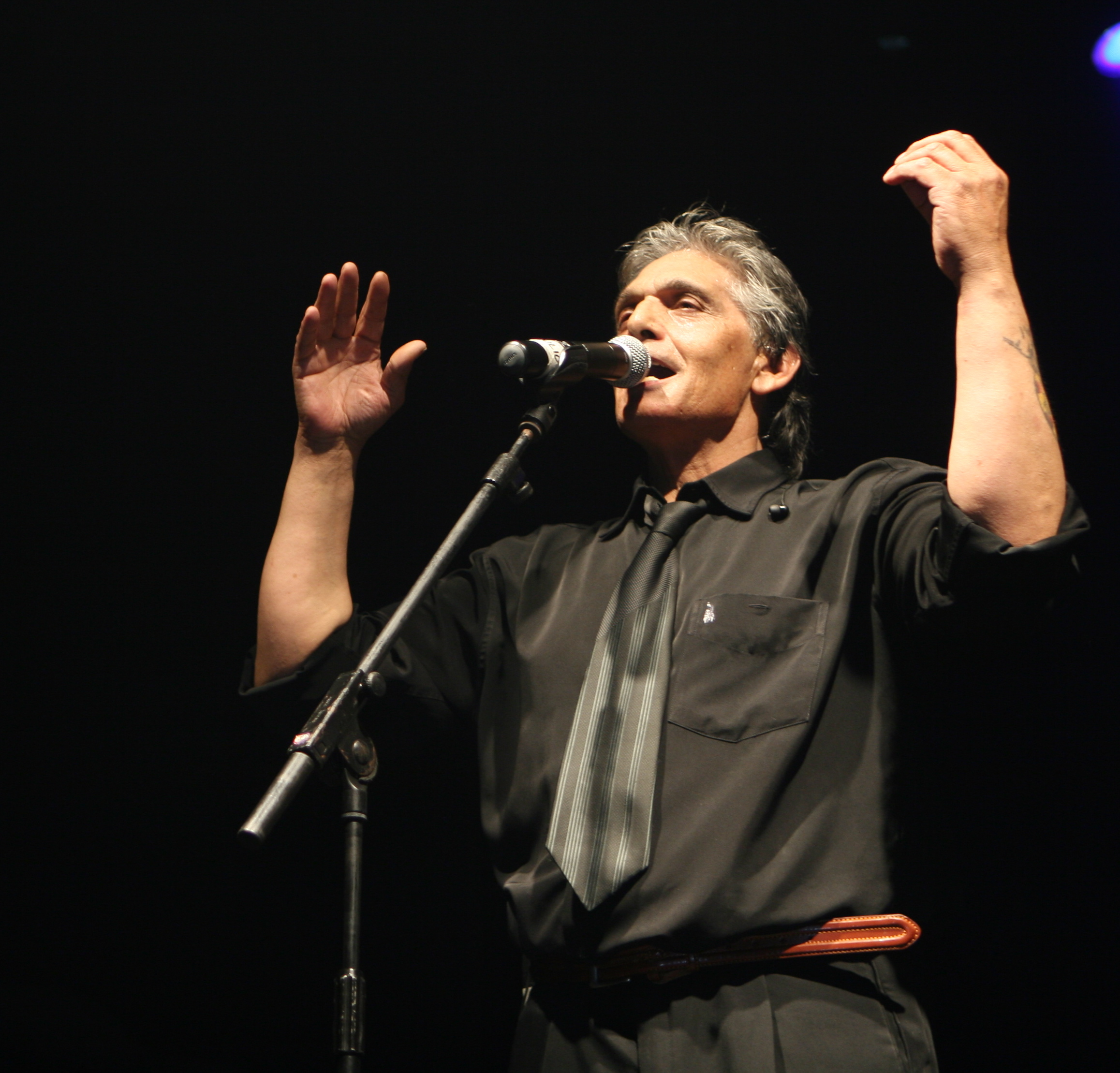 Actuación de los Chichos en la Sala Razzmatazz de Barcelona el 3 de Abril de 2009